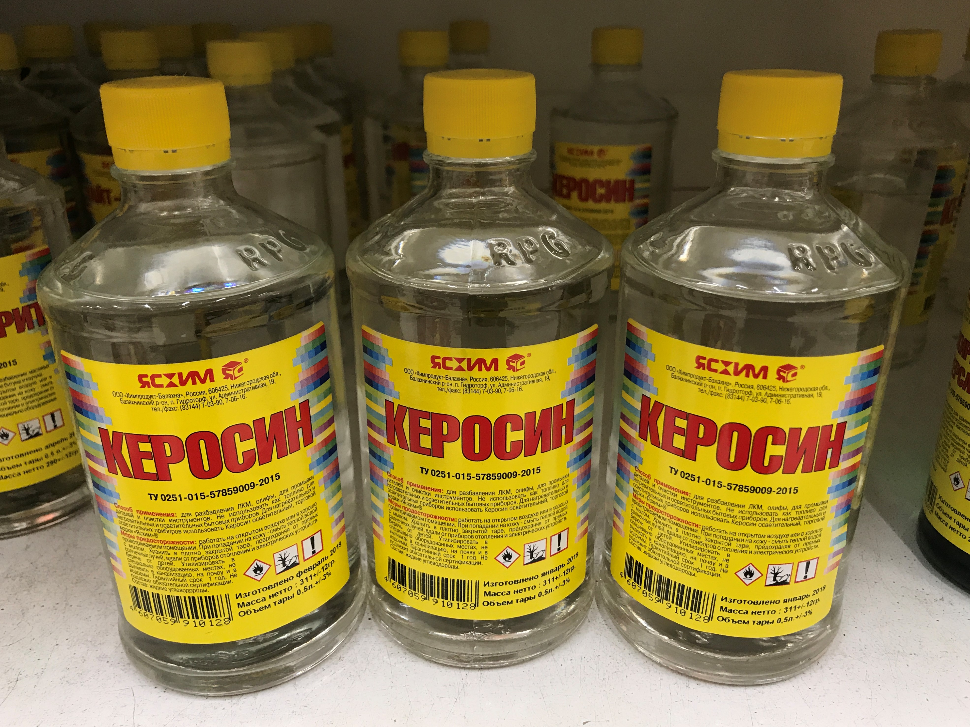 Керосин в стеклянных бутылках